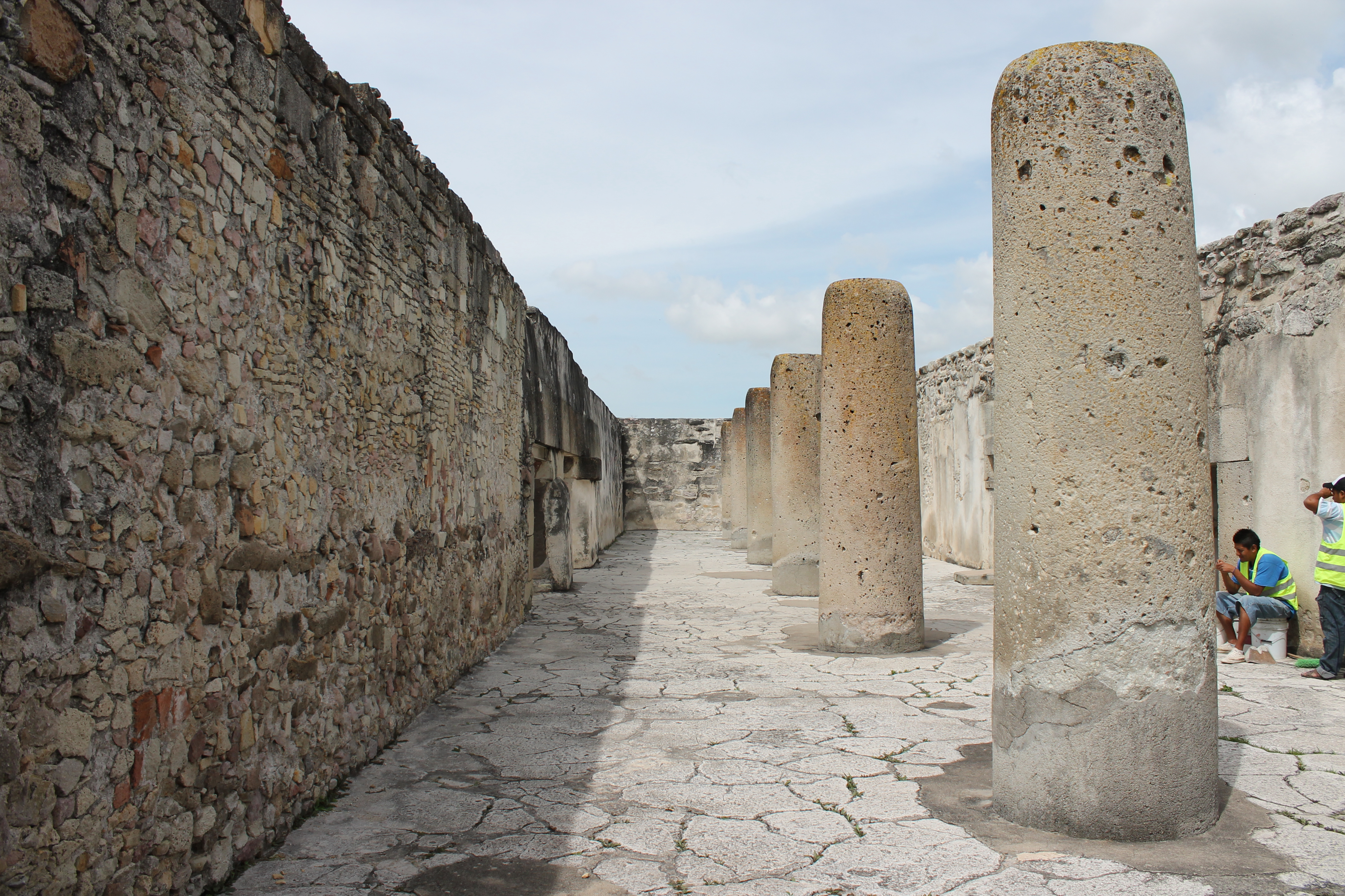 Se muestra el Salón de las Columnas, ubicado entre los patios D y F. Se aprecia una fila de columnas monolíticas.